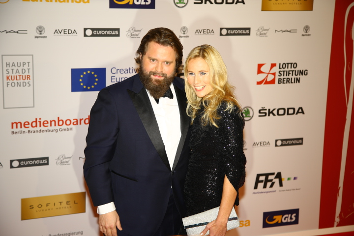 Antoine Monot mit Stefanie Sick, The 28th European Film Awards, 2015